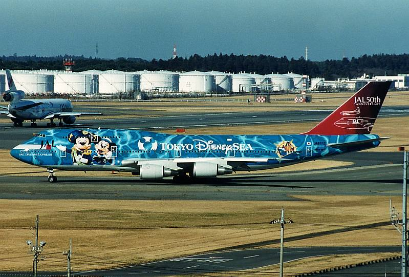 日本航空・JALドリームエクスプレス21・Tokyo DisneySEA号（国際線用）